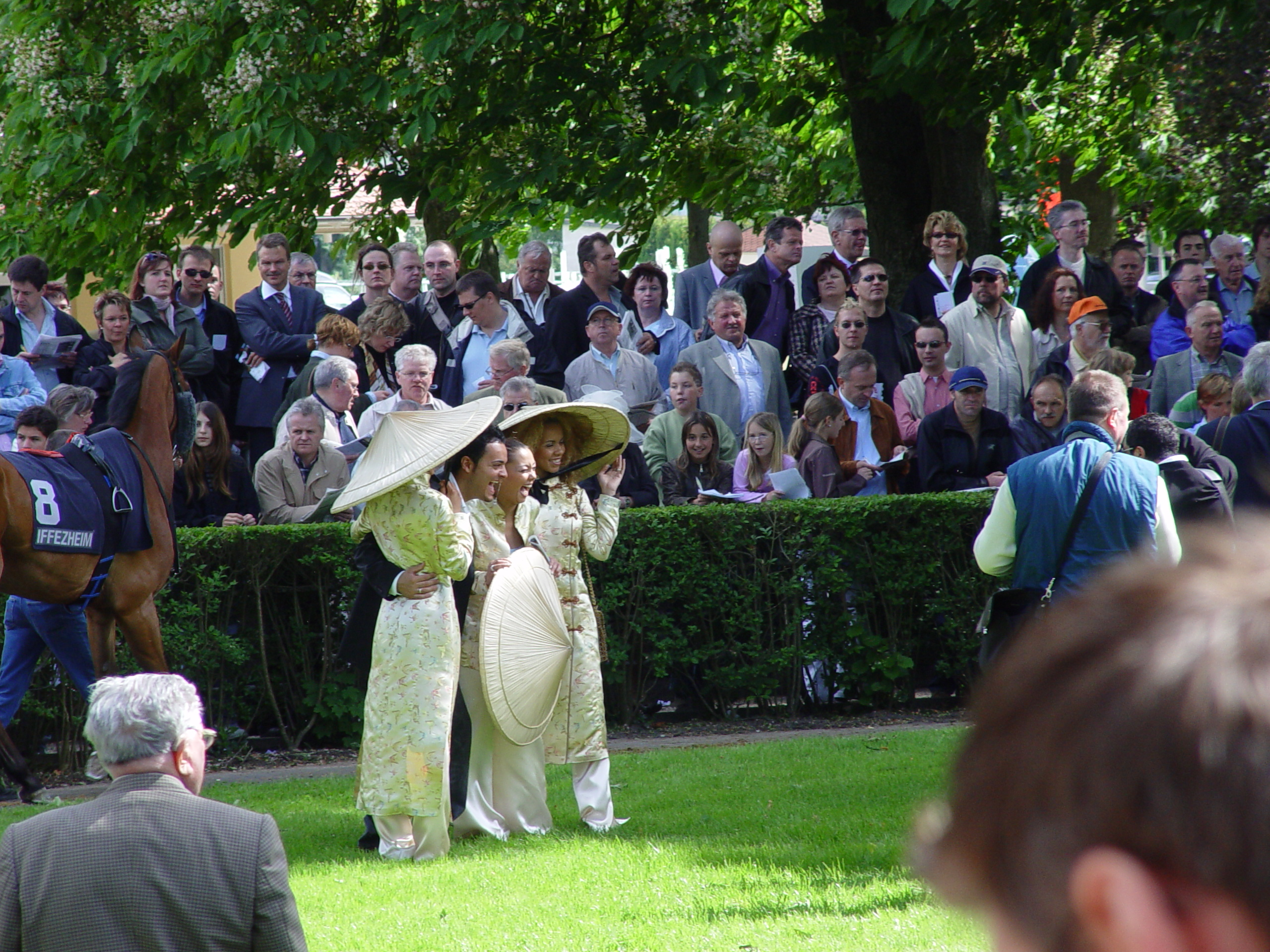 Im Führring werden die Pferde vor dem Rennen den Zuschauern und Tippern gezeigt. Er dient gleichzeitig vielen Pferde- und Rennstallbesitzern, so wie einigen Prominenten, als Präsentationsplattform, daher tummeln sich dort neben Pferden auch viele Fotografen.